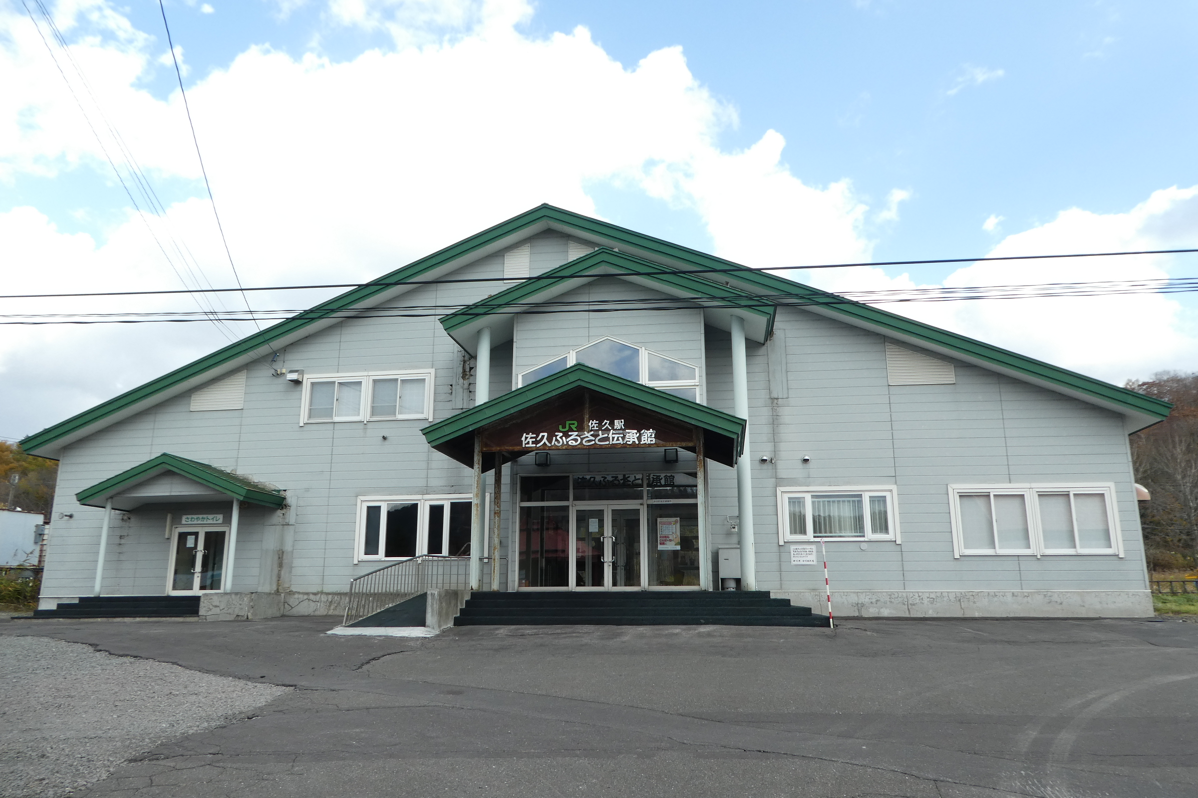 佐久駅駅舎。